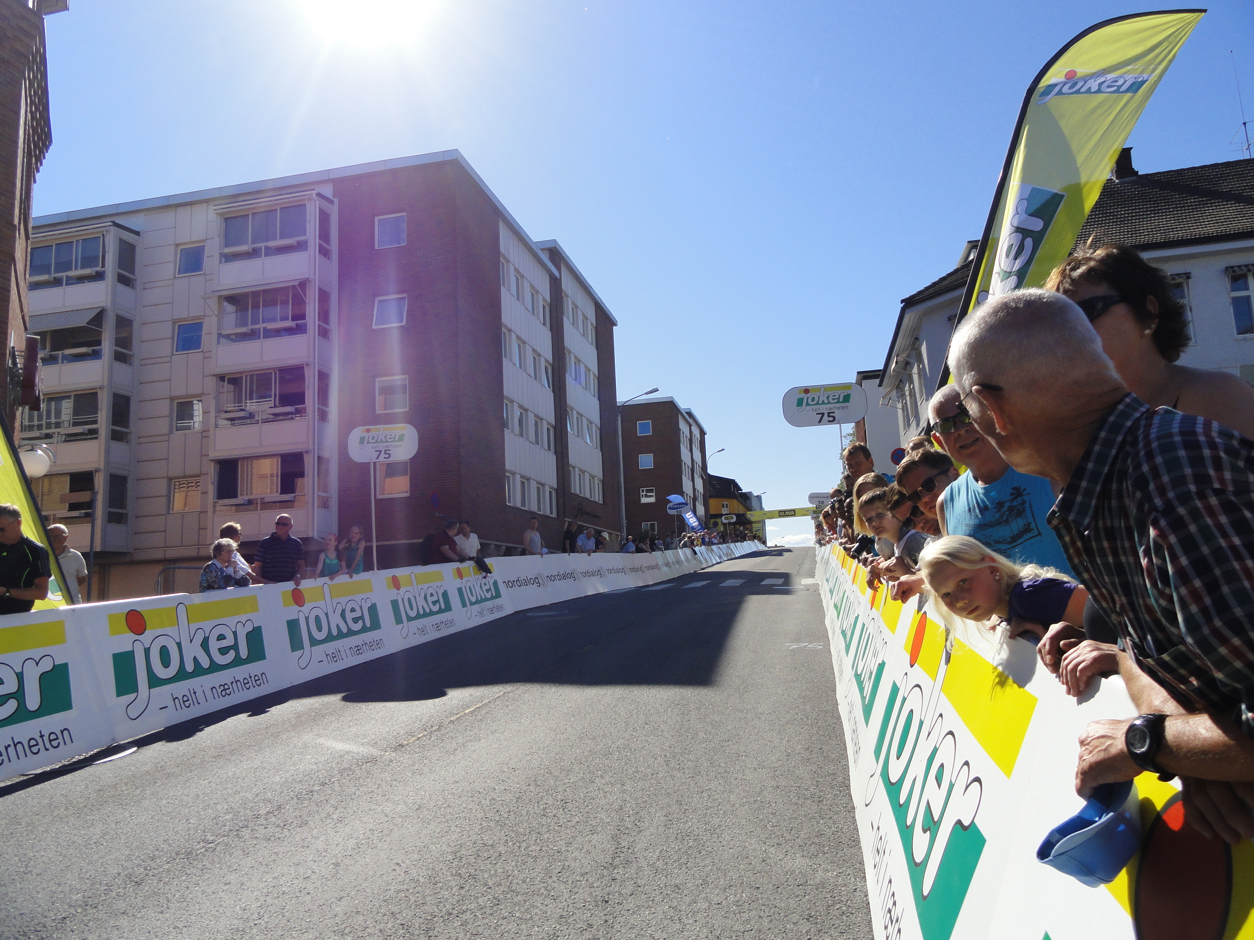 målgang på etappe 4 i tour of norway